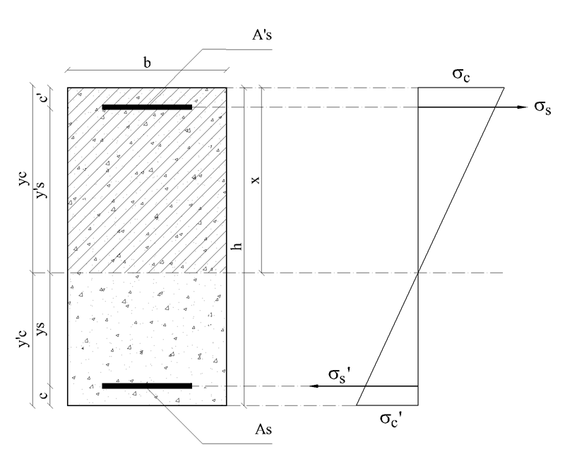 Schema grafico di sezione rettangolare di una trave inflessa